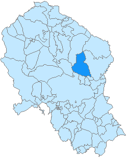 Mapa de Adamuz en la provincia de Córdoba, Andalucía, España.